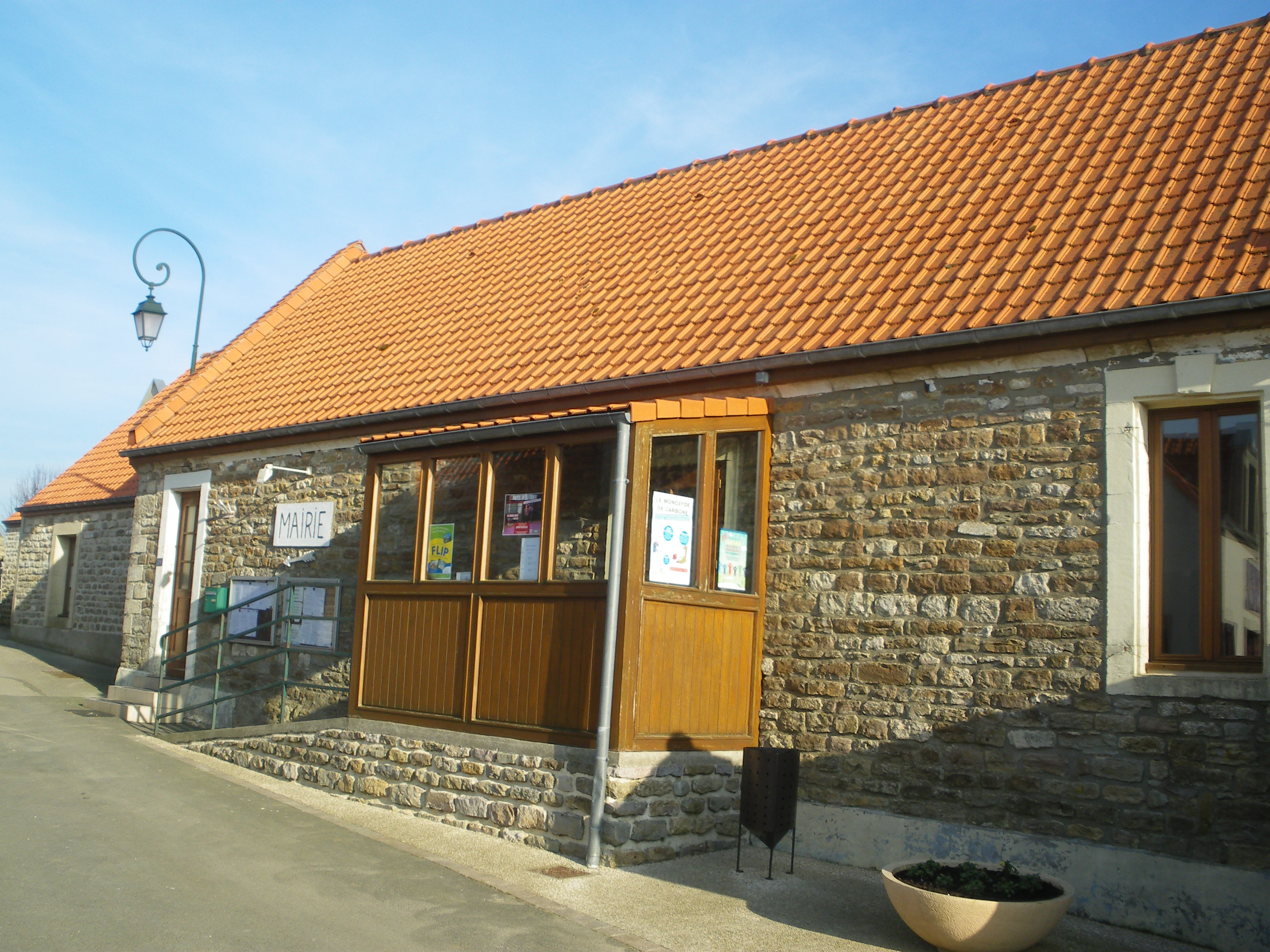 Vue de la mairie de Bazinghen.